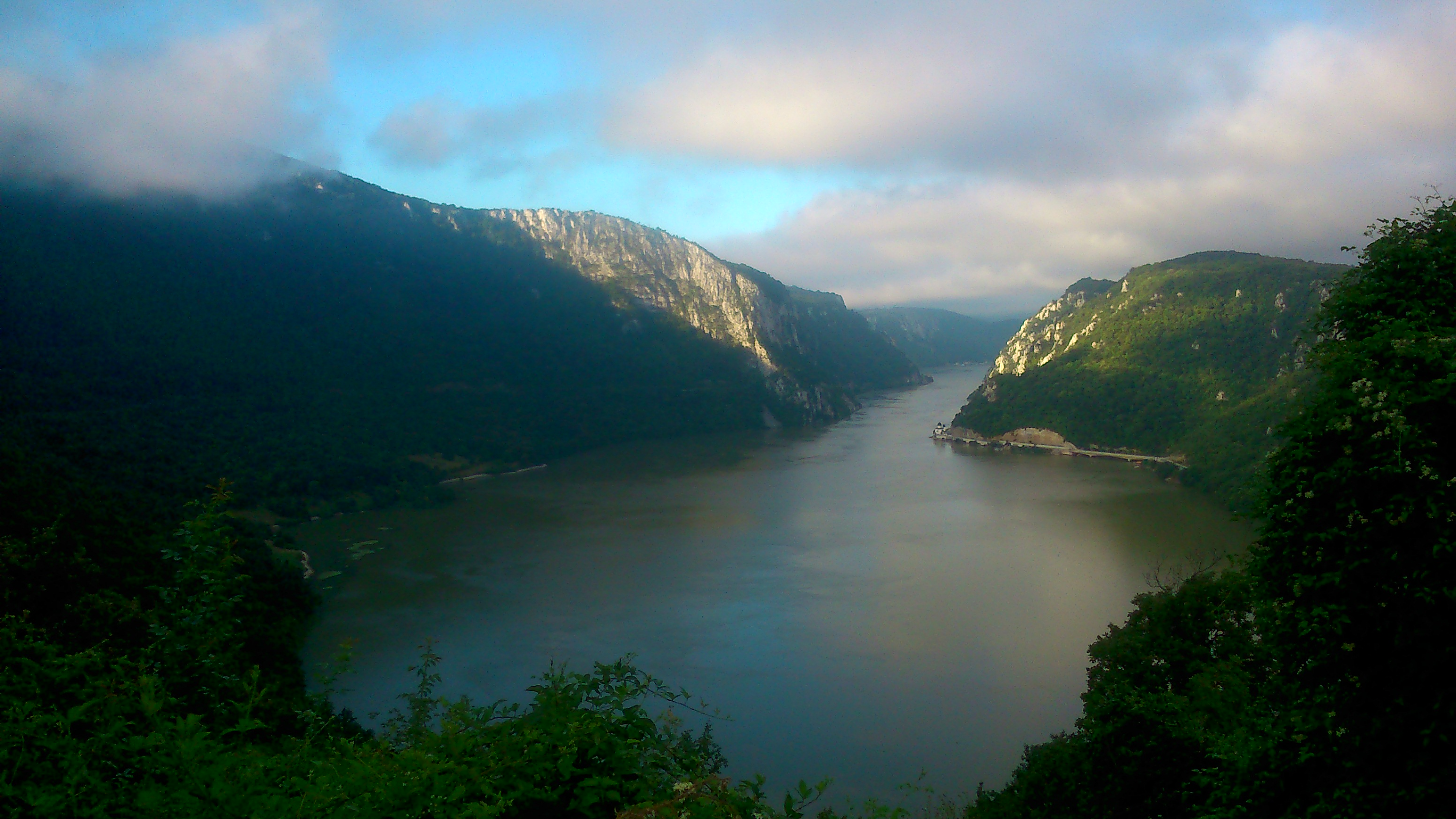 Ово је фотографија заштићеног природног добра у Србији под шифром: НП04 This is a a photo of a natural area in Serbia with ID: НП04 Djerdapska klisura